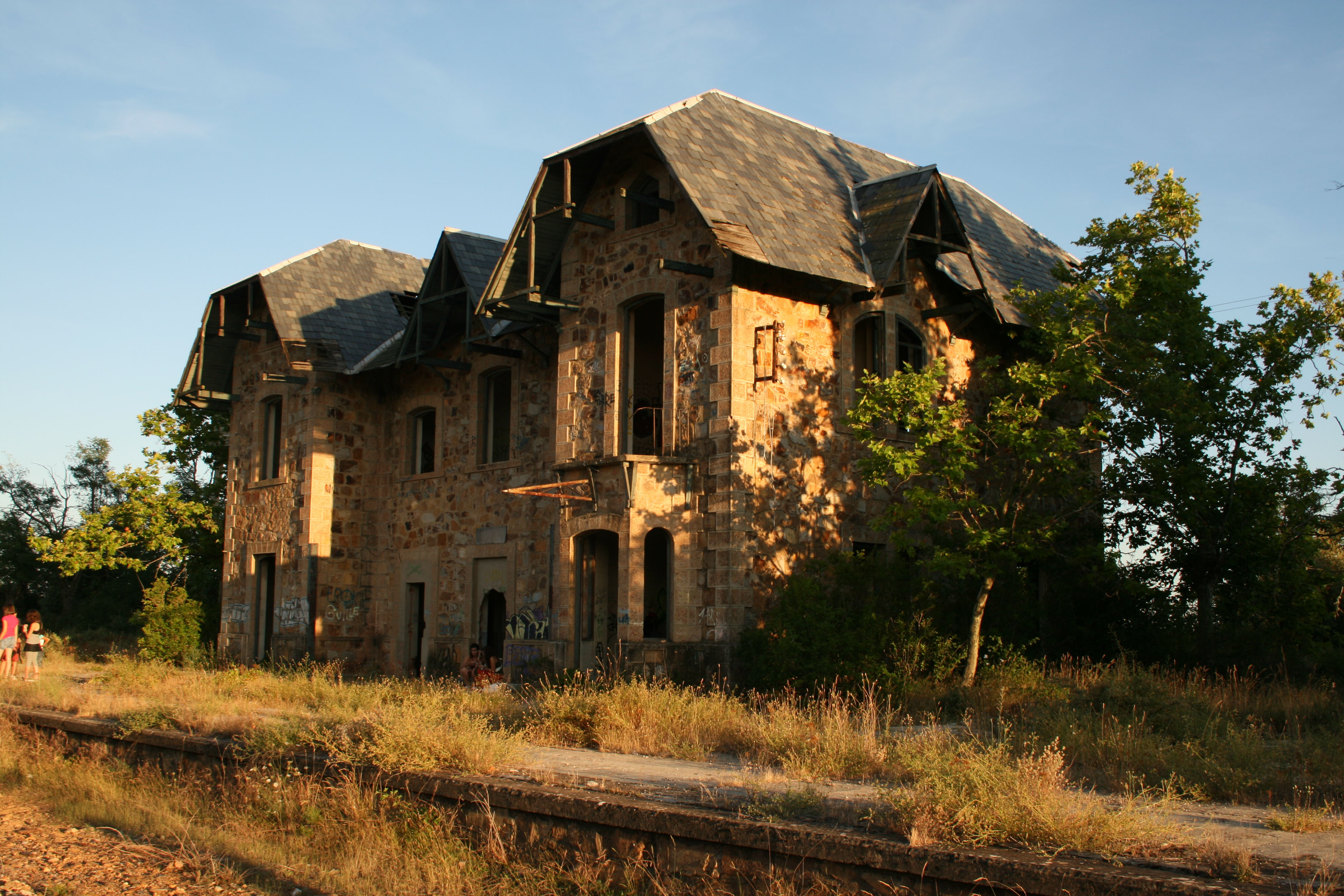 La estación de Las Torres de Aliste - provincia de Zamora.